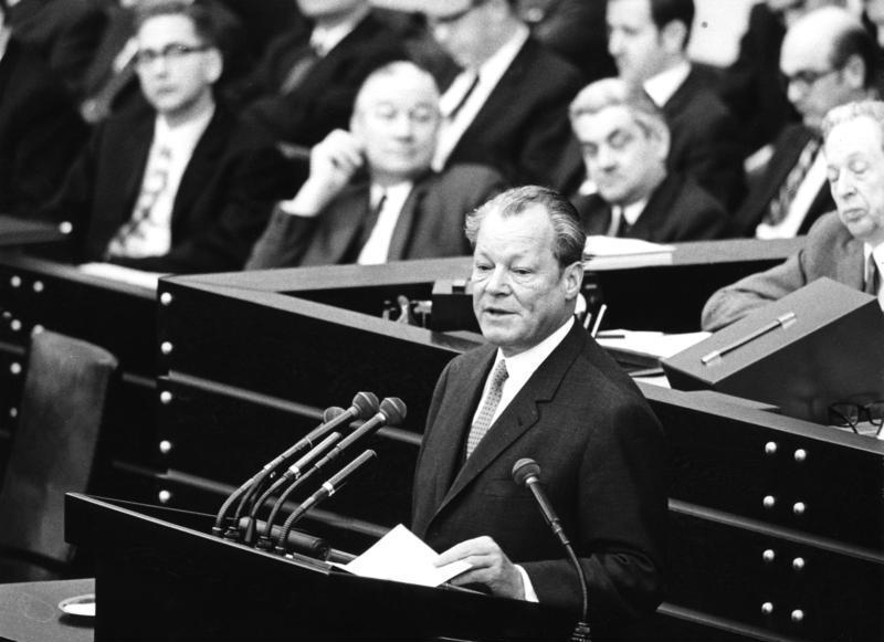 28. Januar 1971 Bundeskanzler Willy Brandt: Bericht zur Lage der Nation im Bundestag